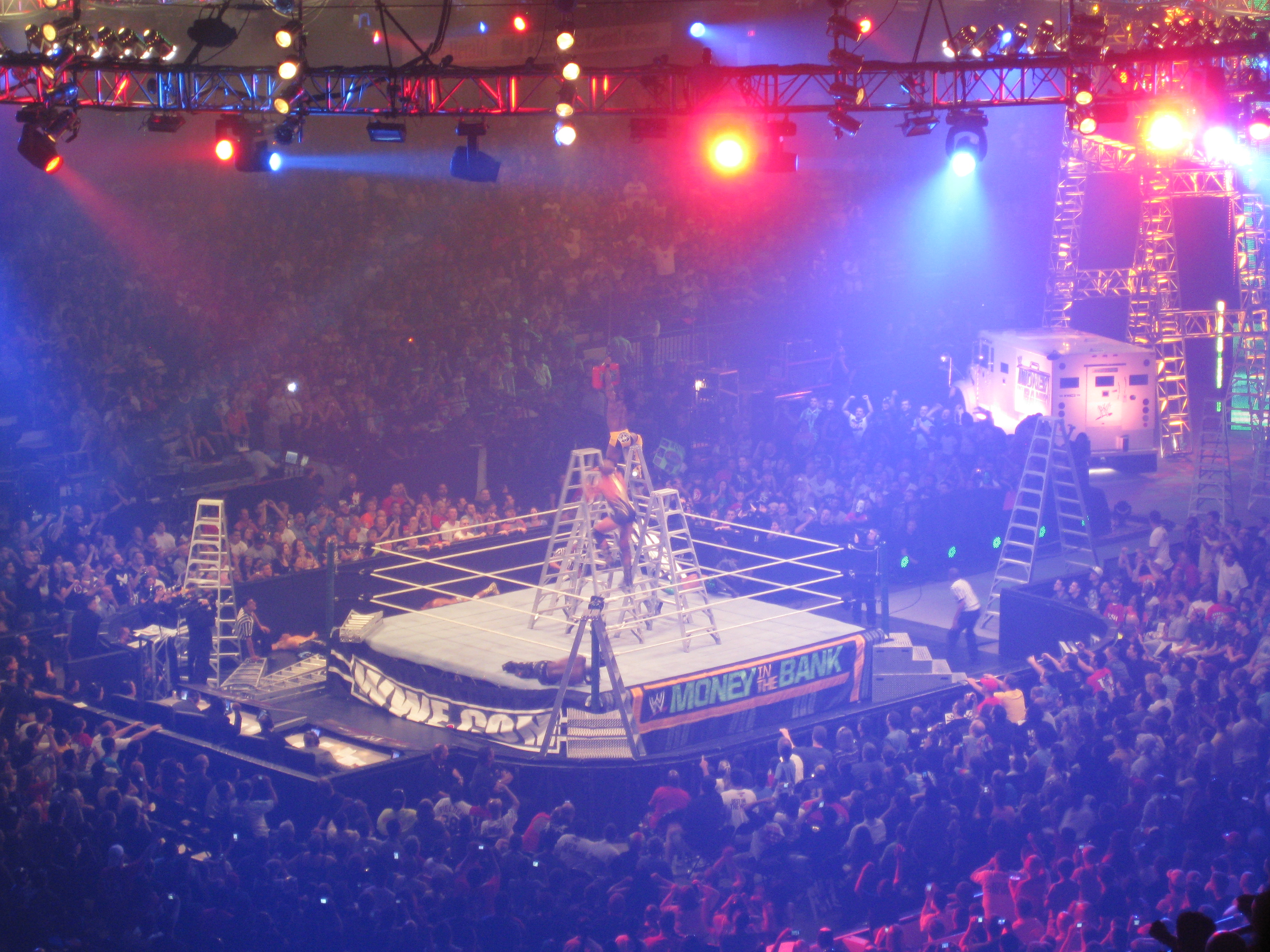 RAW MITB Ladder match